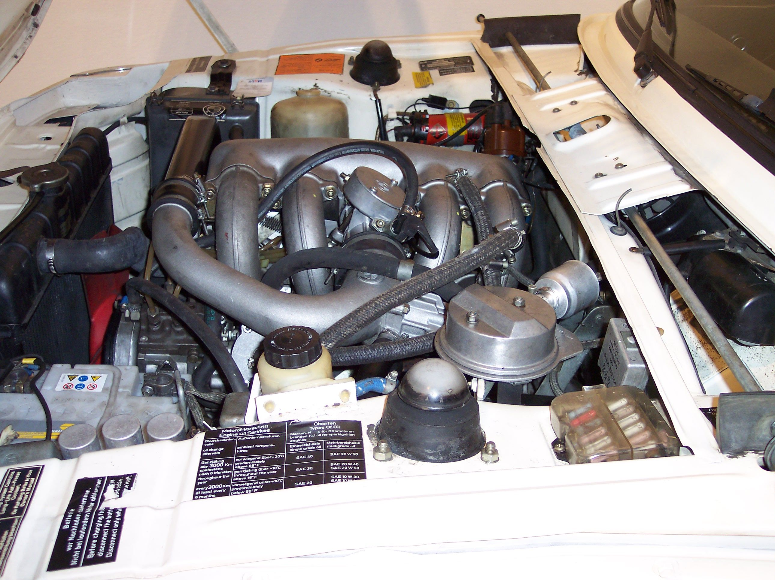 BMW 2002 turbo engine